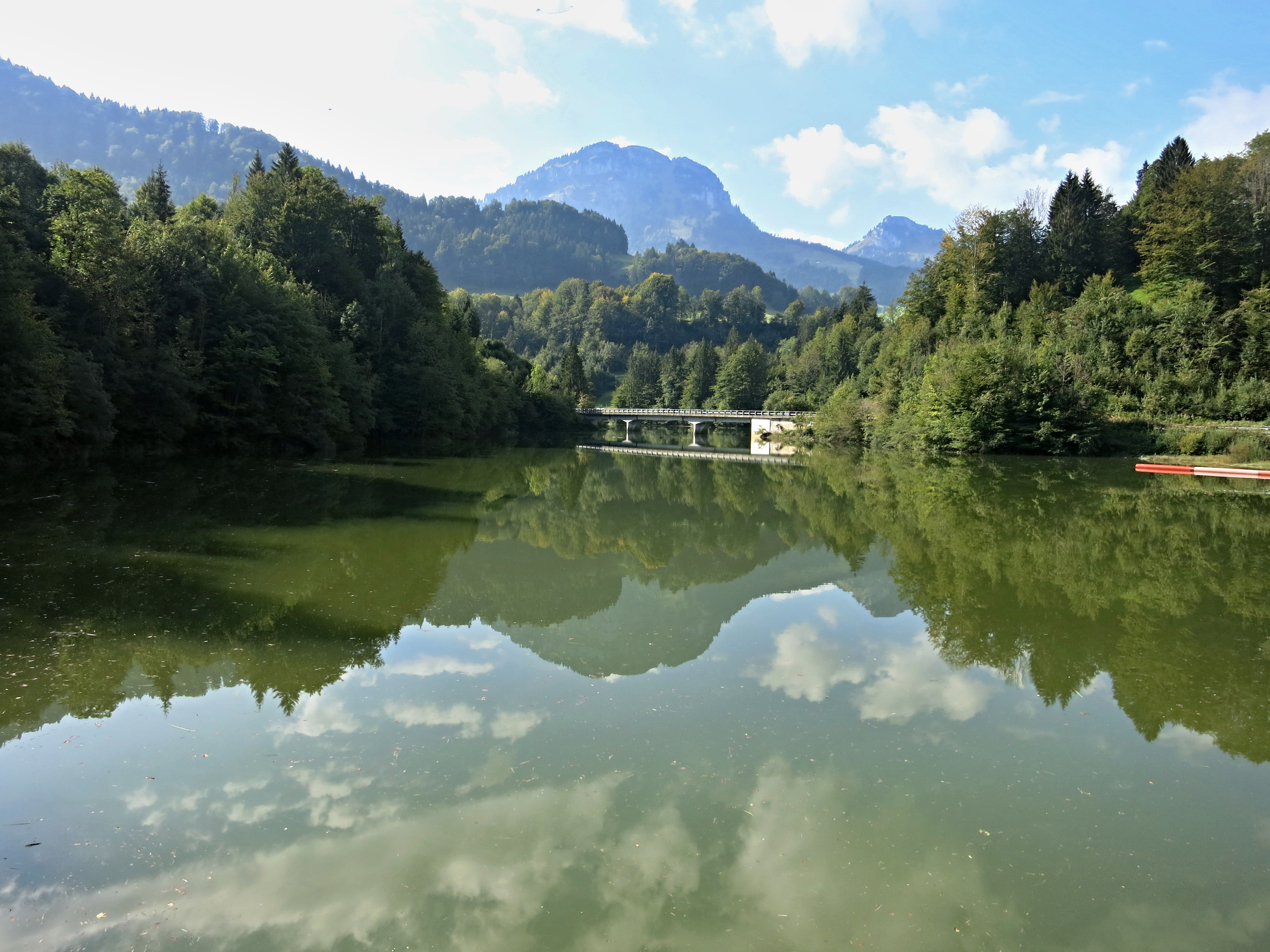 Rämpensee